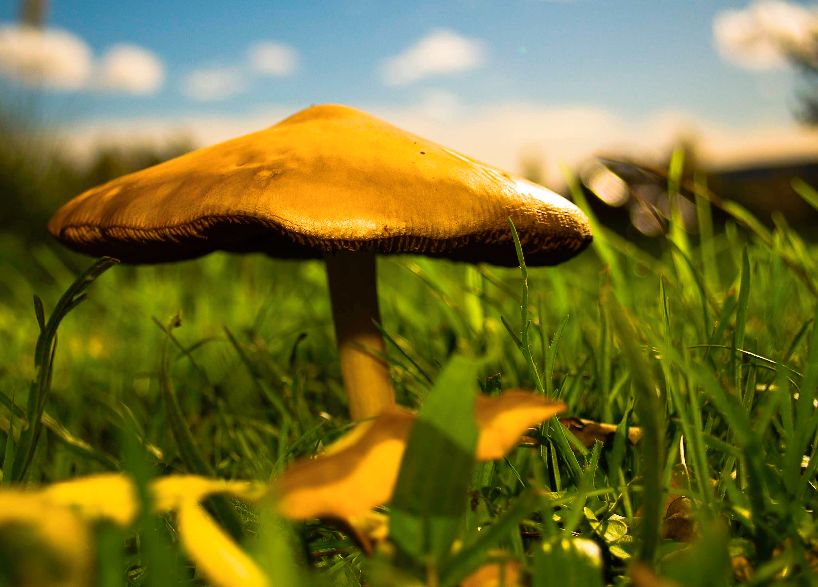 Seta en un huerto Para la chica del pelo corto y alborotado